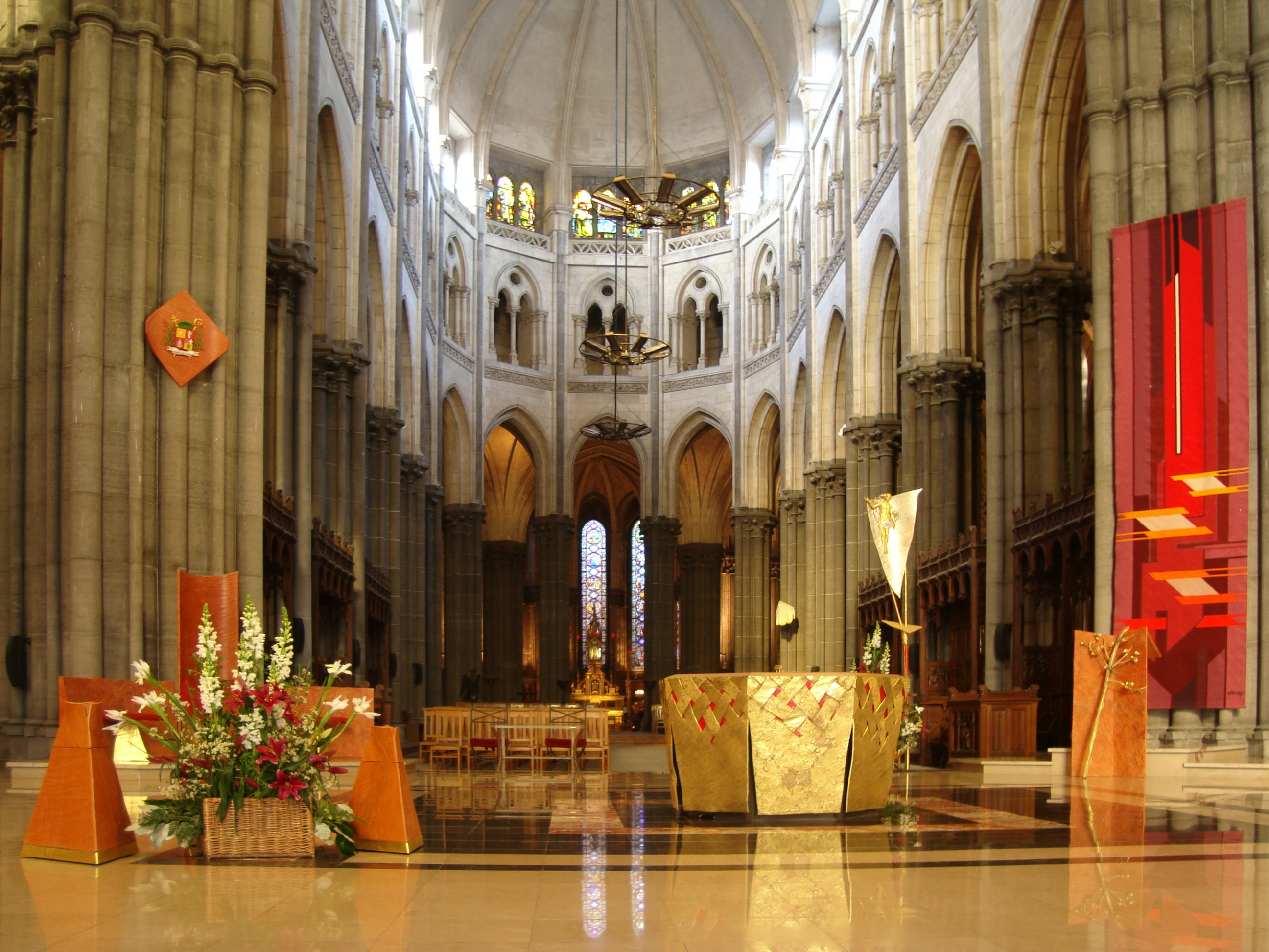 Le chœur de la cathédrale Notre-Dame-de-la-Treille de Lille (Nord).